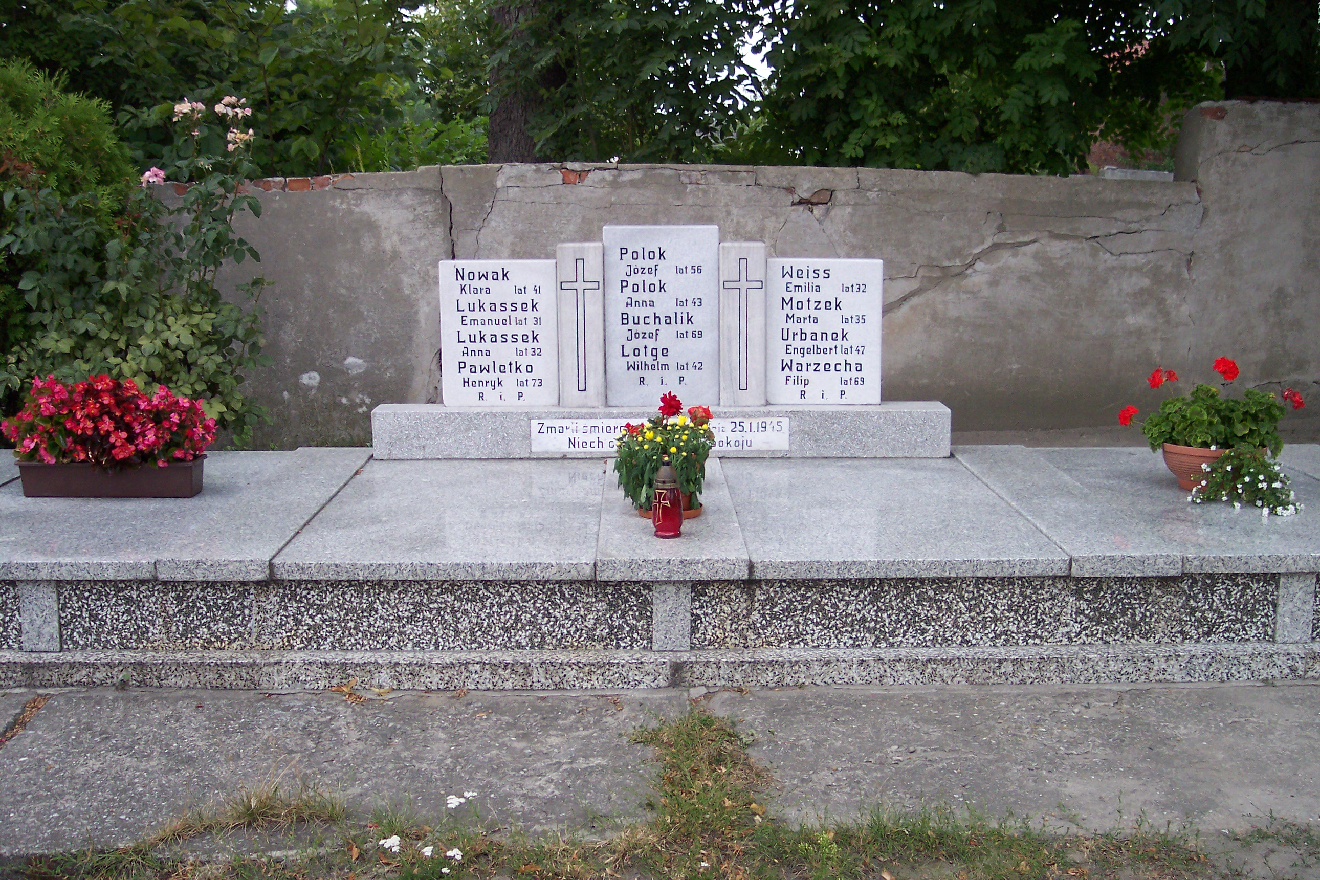 Groby osób rozstrzelanych przez Armię Czerwoną 25.01.1945 w Rudnie